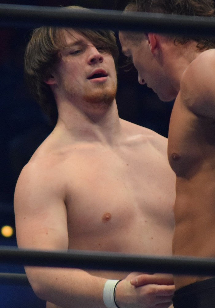 2016年2月11日 大阪府立体育会館 「THE NEW BEGINNING in OSAKA」 デビッド・フィンレー